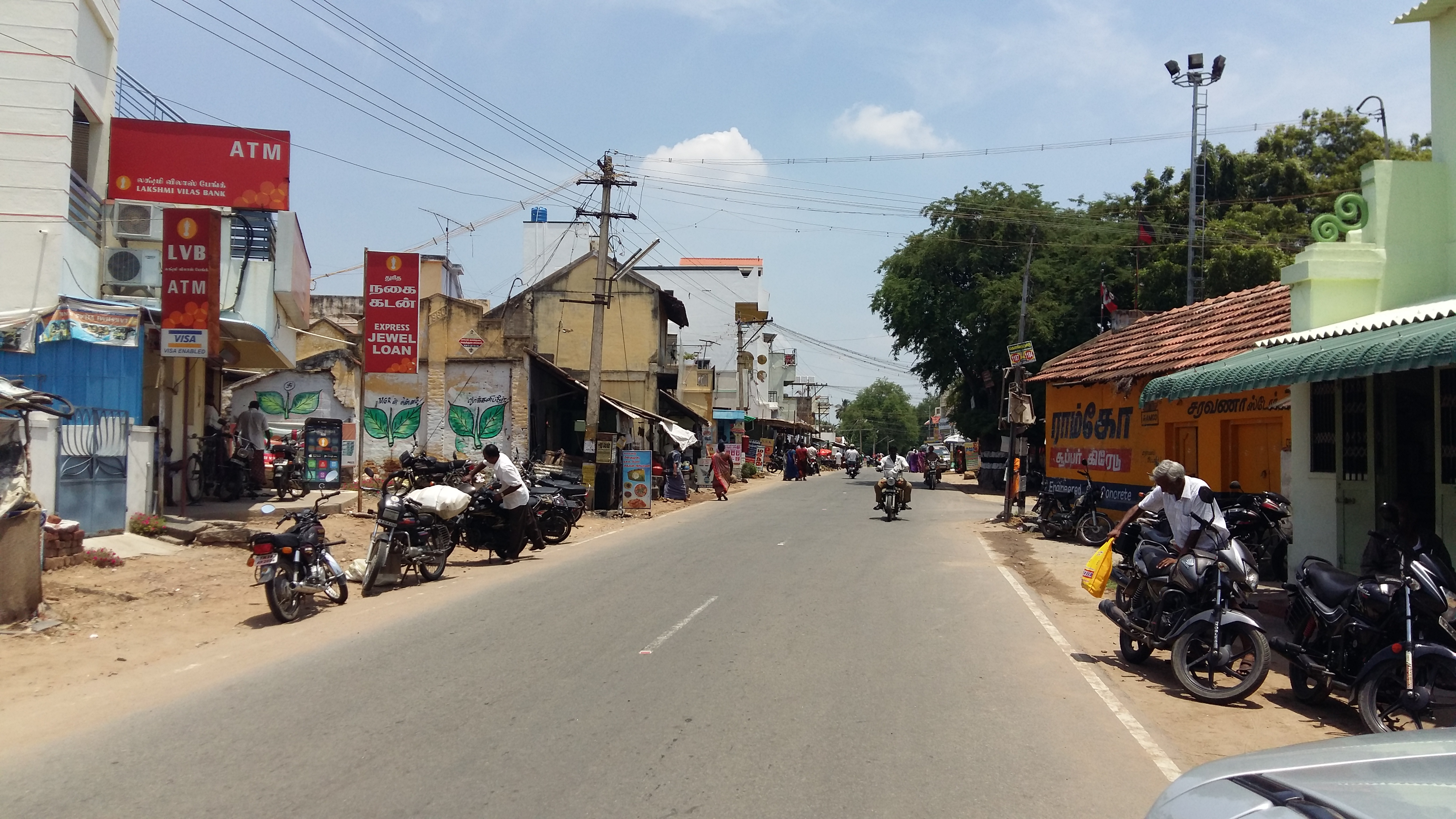 முத்துகாபட்டி (லட்சுமி விலாஸ் வங்கி தெரிகிறது, பெரிய கம்பம் உள்ளது பெரியசாமி கோவிலுக்கு செல்லும் சாலை)